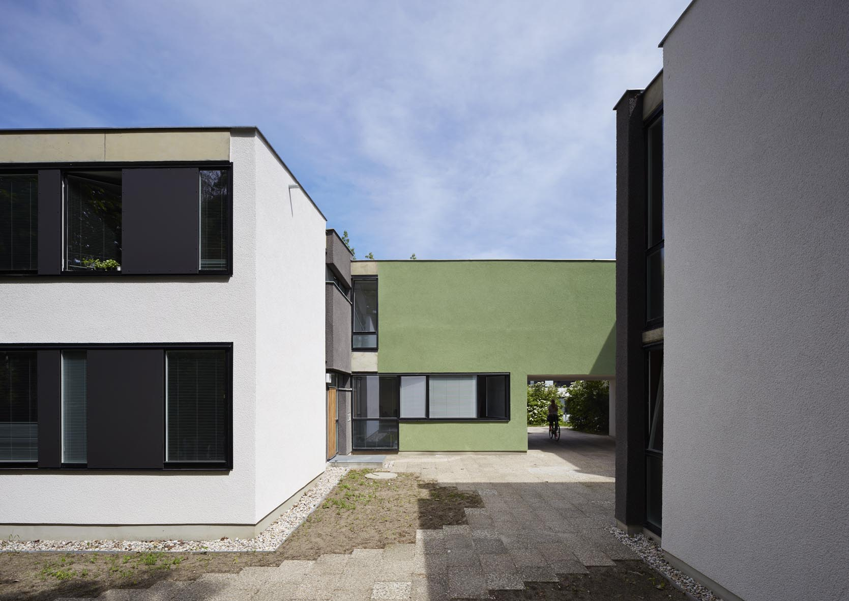 Studentendorf Schlachtensee, Berlin, Haus 5-25